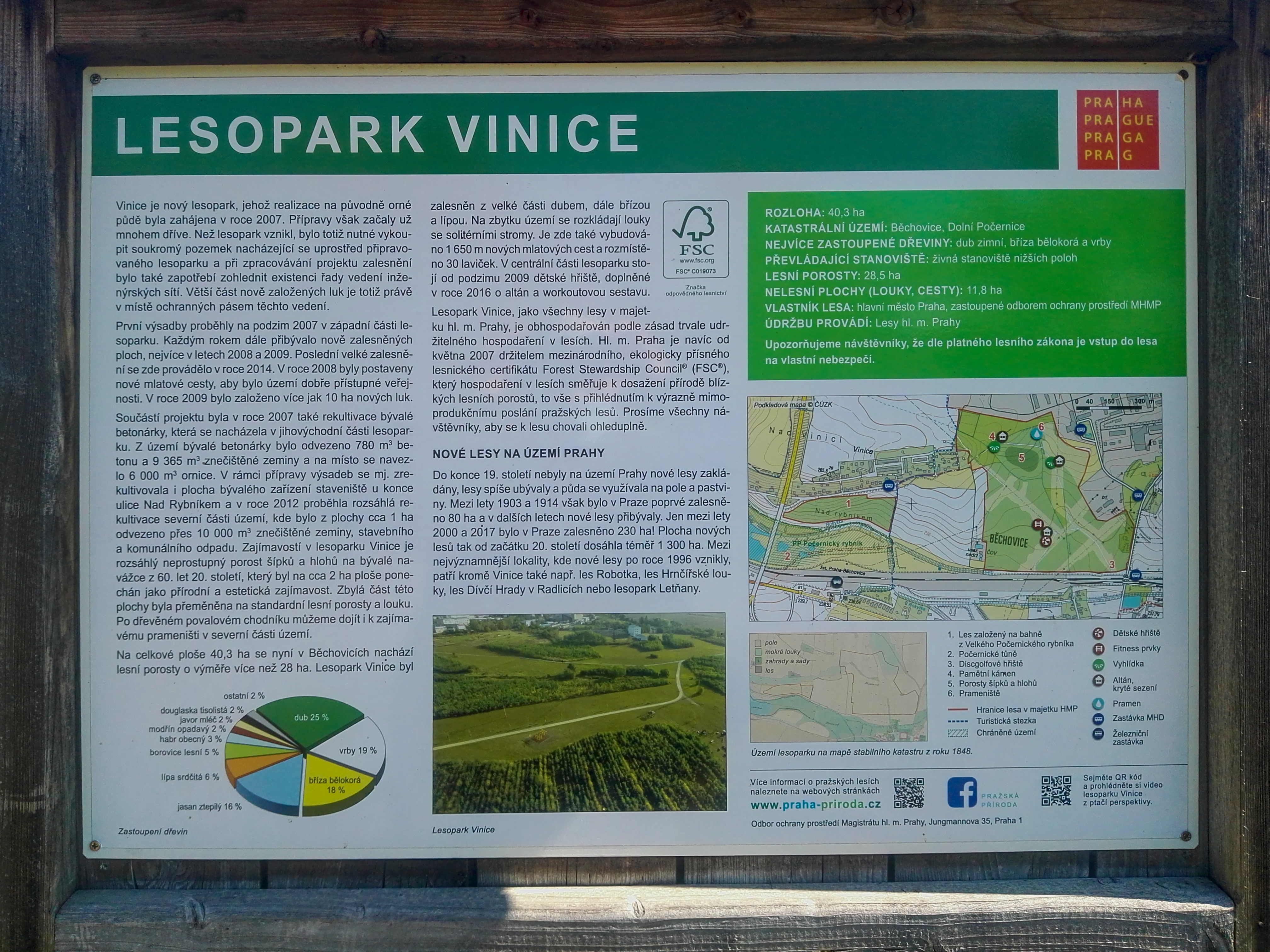 Lesopark Vinice v Praze-Běchovicích, informační tabule